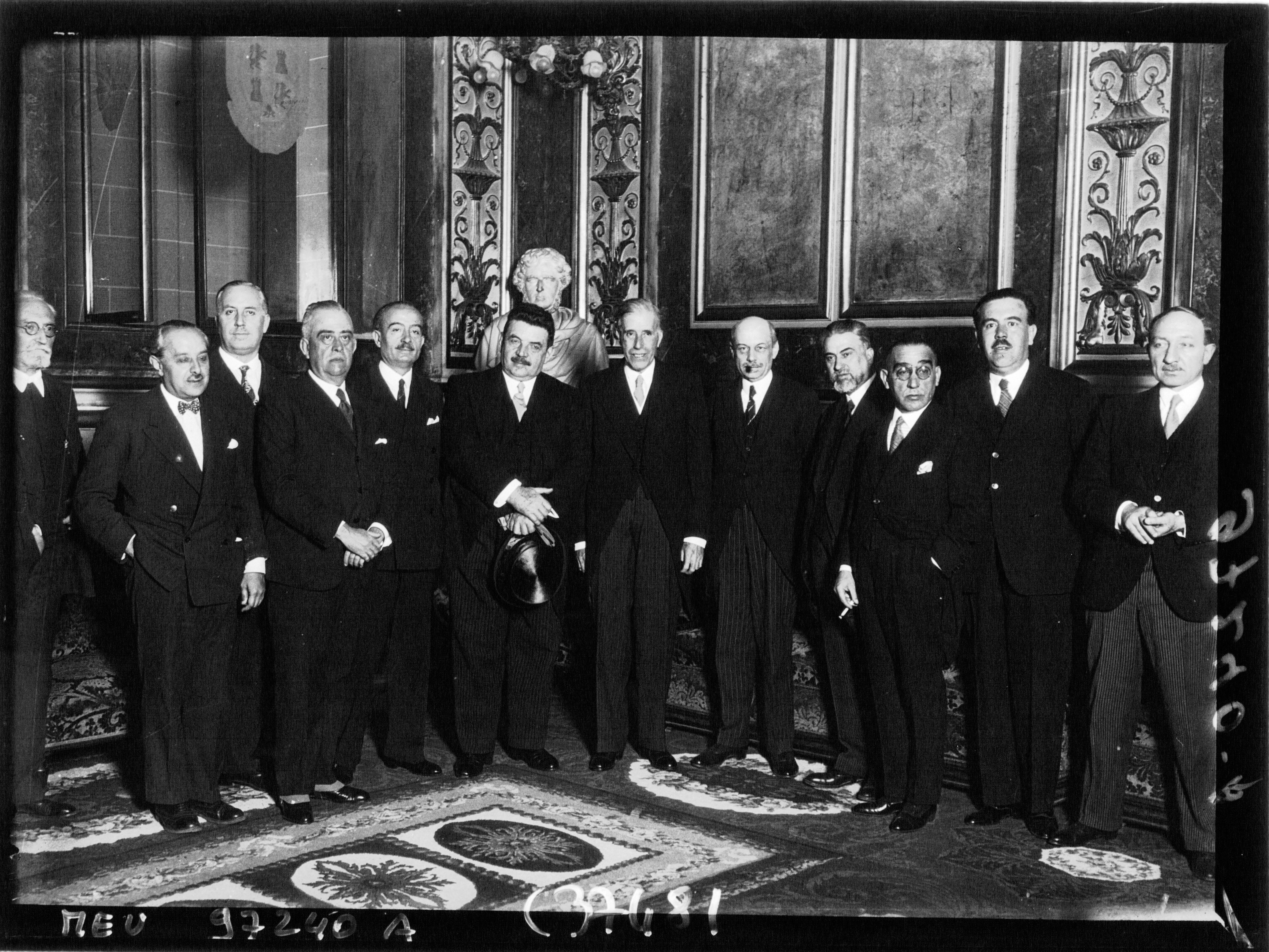 Vista de Édouard Herriot a España en 1932.